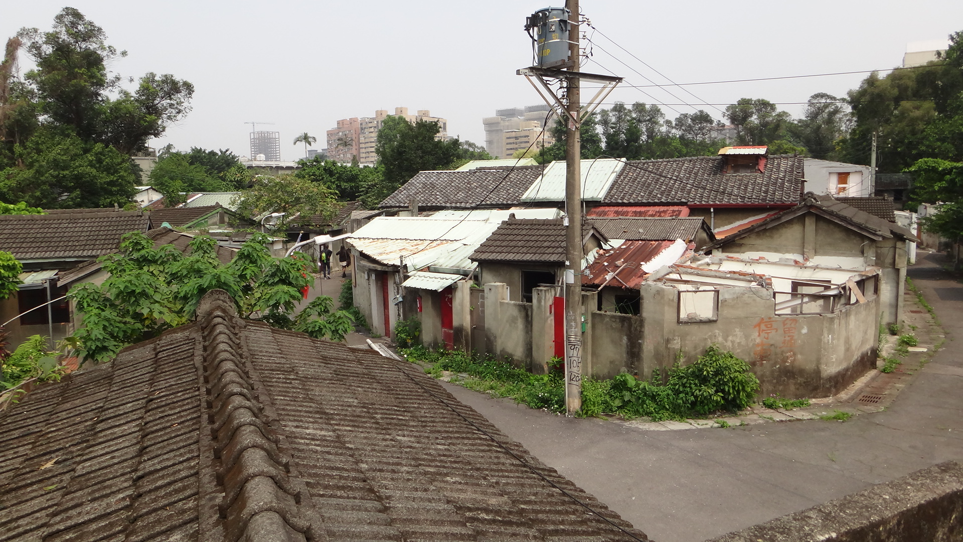 中文（台灣）: 嘉禾新村小圓環